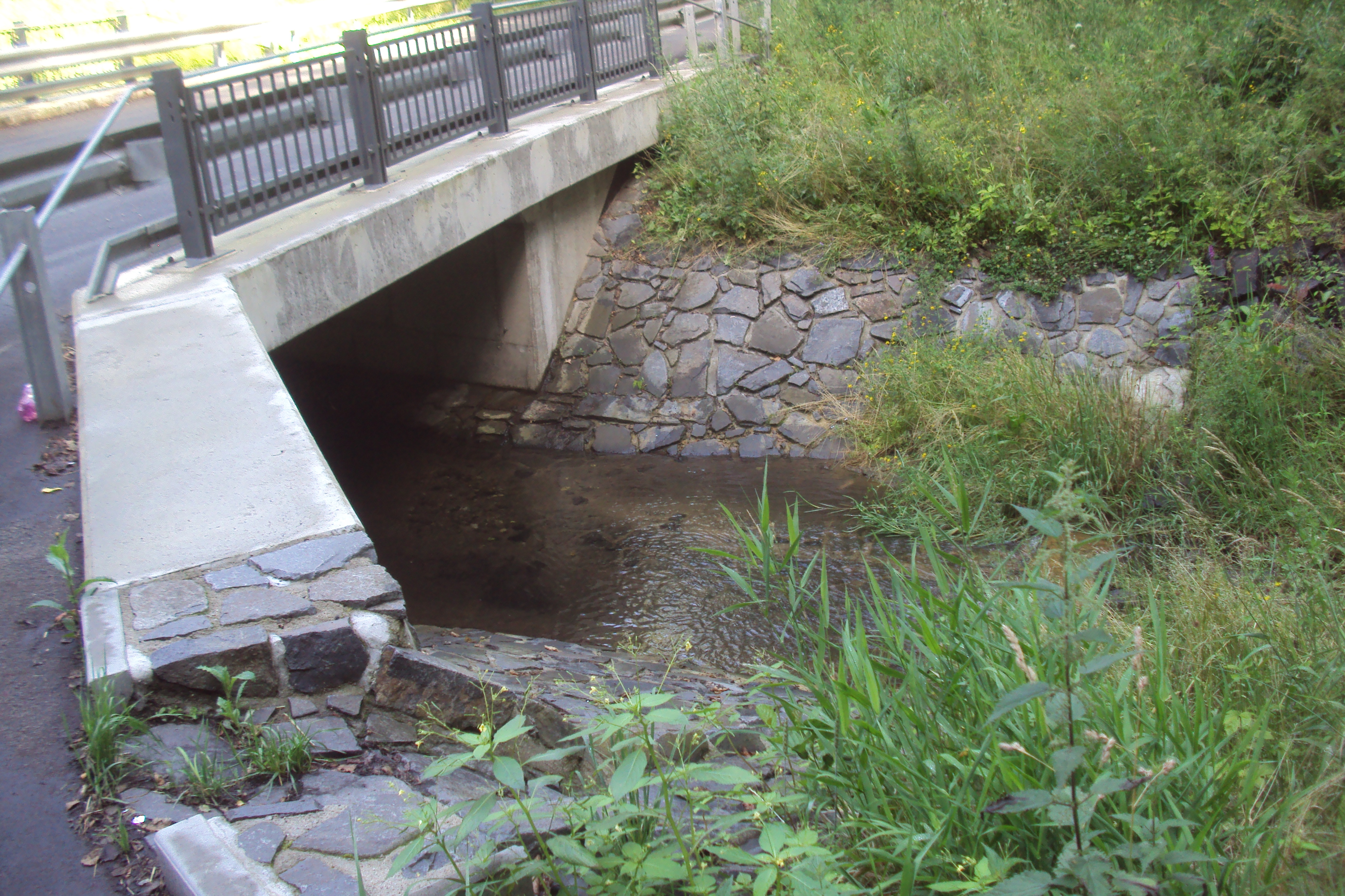 Potok podtéká silnici směr Nové Zákupy a Velenice